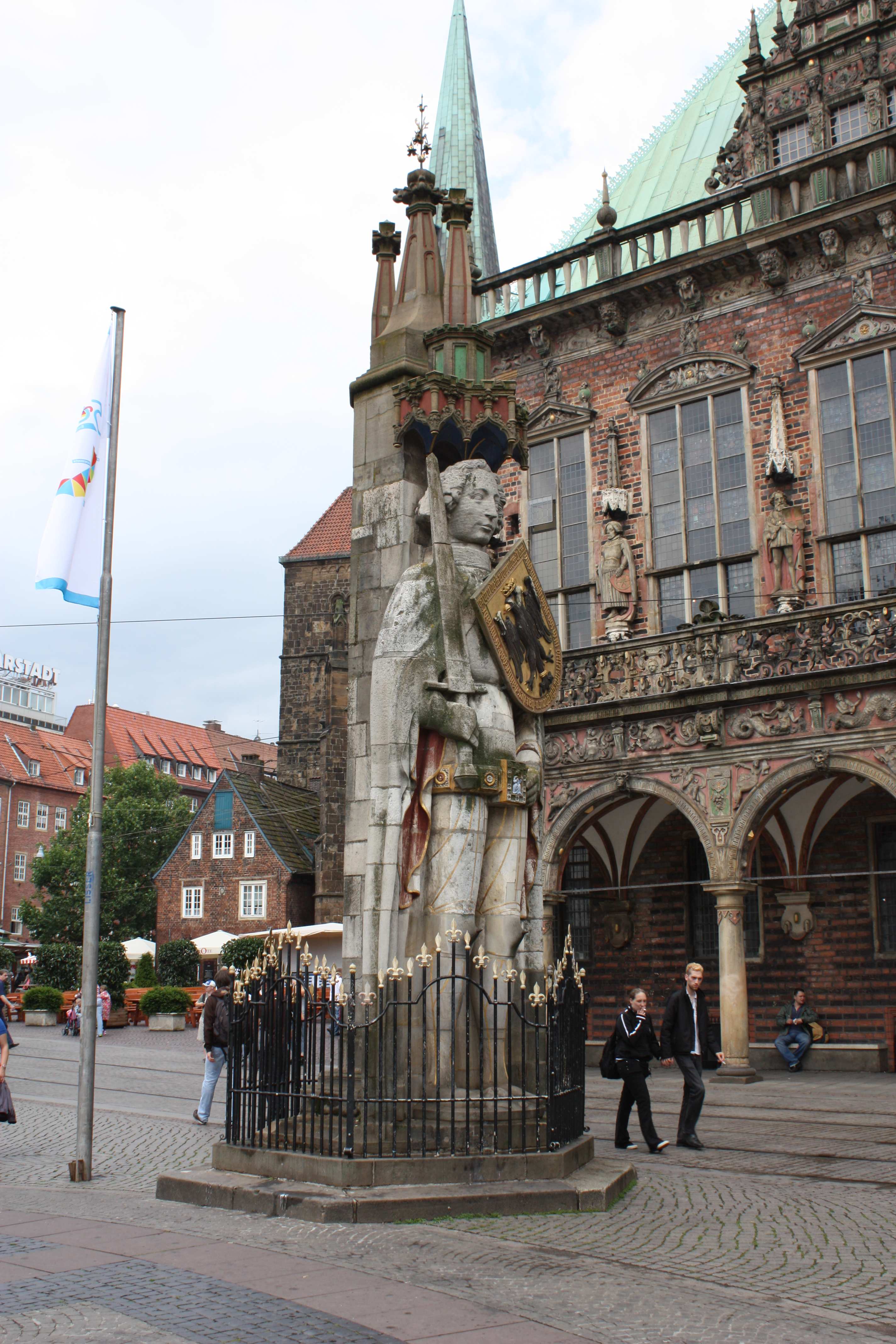 Bremer Roland; 2009